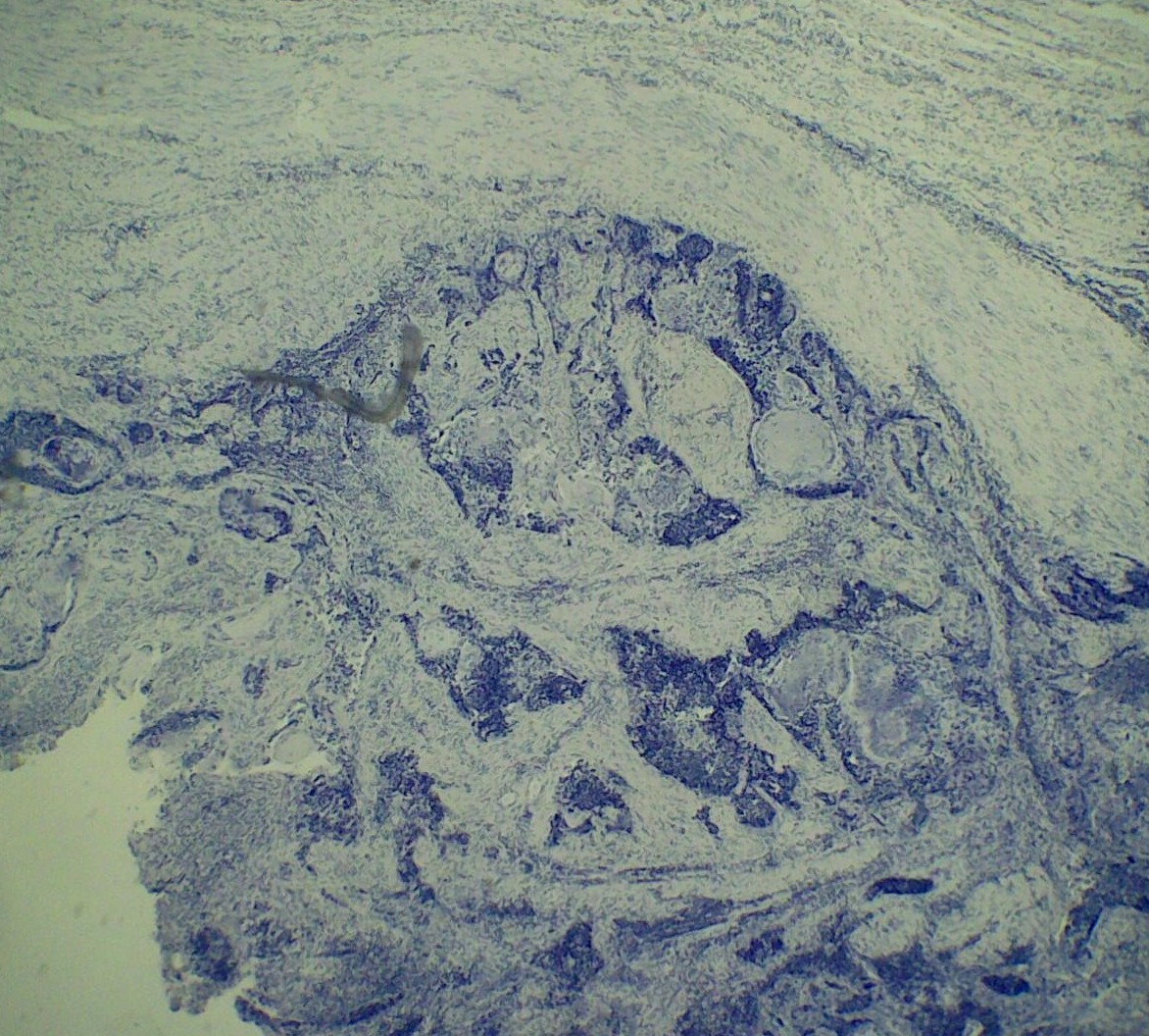 Плоскоклеточный умеренно дифференцированный рак